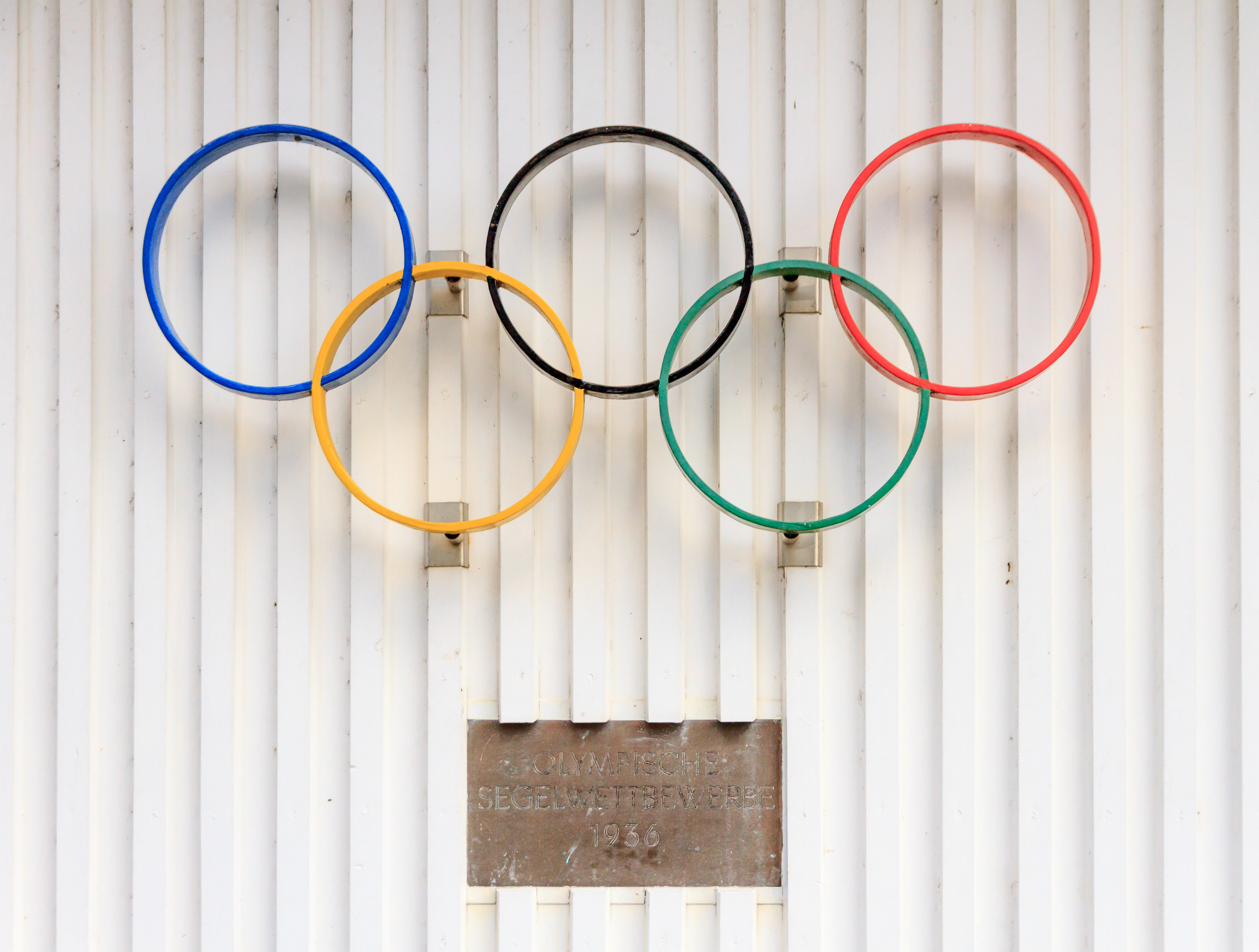 Olympische_Spiele_1936_- Gedenkstafel an die Segelwettbewerbe_in_Kiel am Sportboothafen Düsternbrook